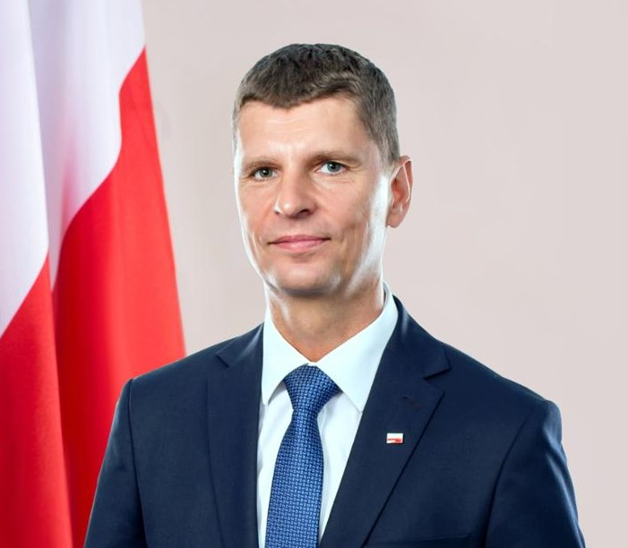 Dariusz Piontkowski, minister edukacji narodowej